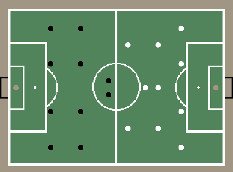 Schema de football Création personnelle